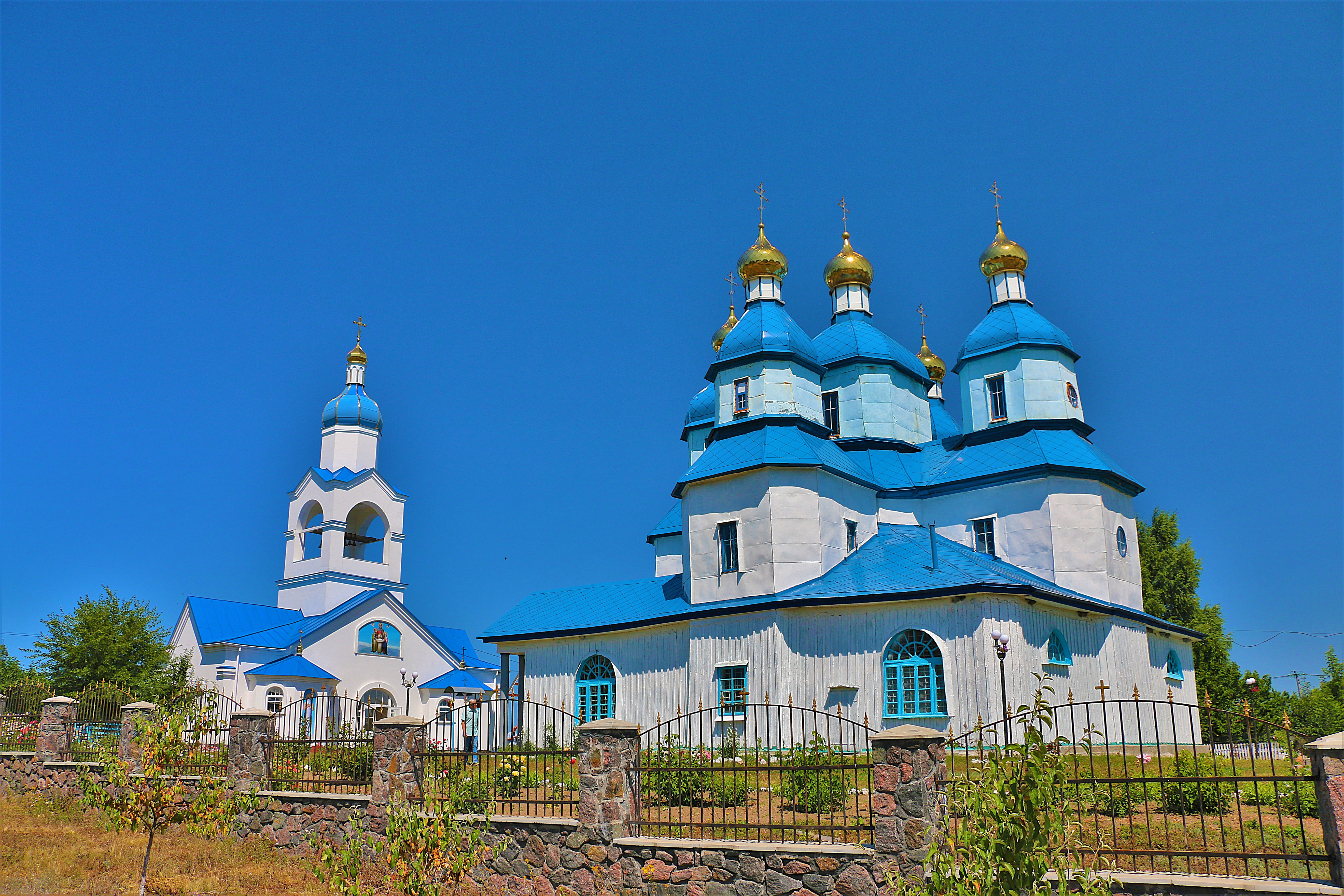 Михайлівська церква (дер.), Дашів, вул. Кірова,13